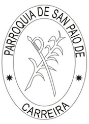 Escudo parroquial de Carreira, en el municipio de Ribeira (A Coruña, España)